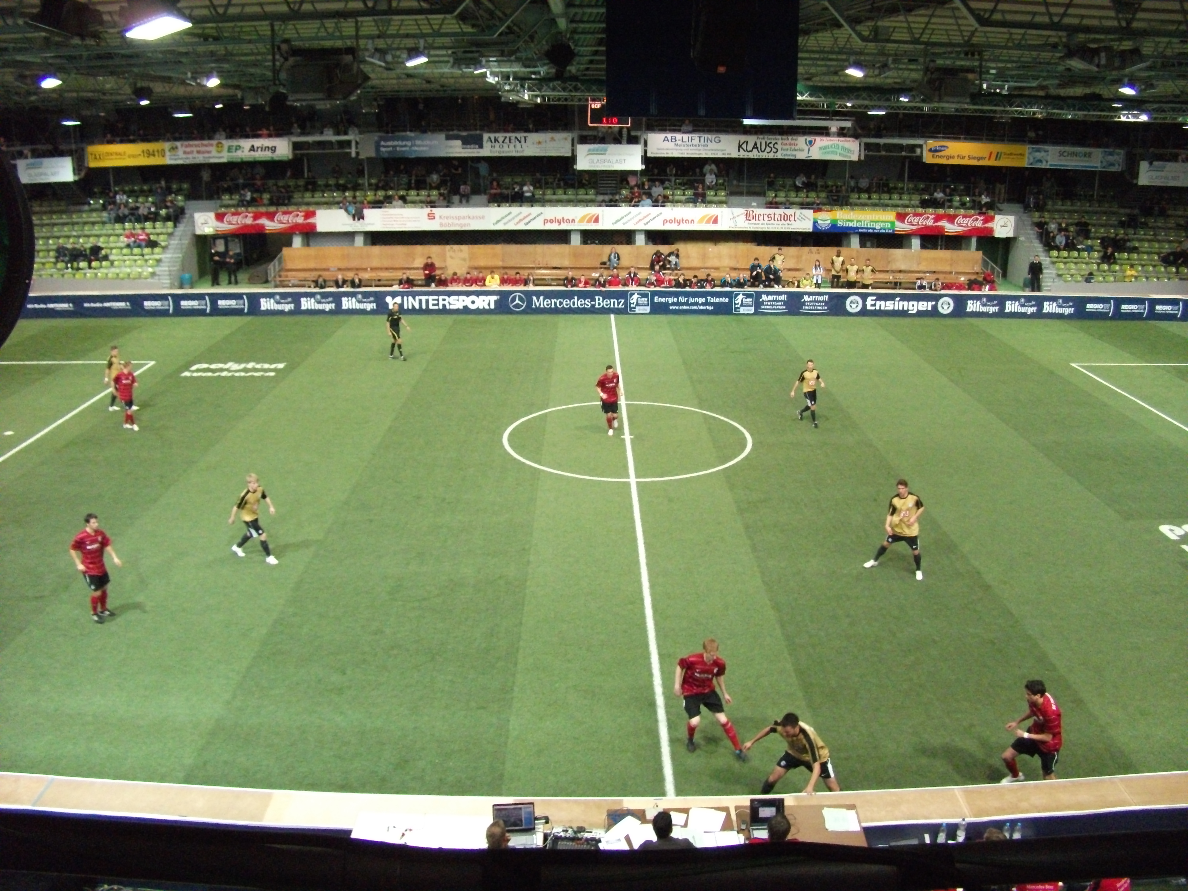 Mercedes-Benz Junior Cup 2011